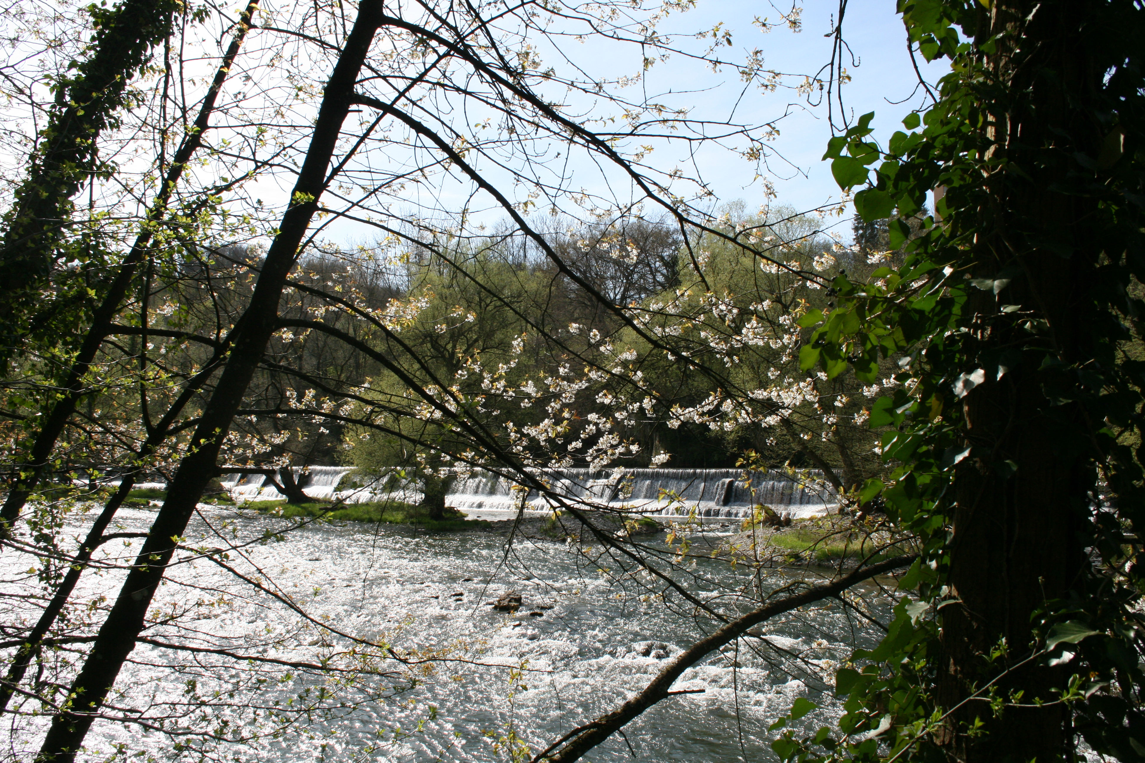 Limmat zwischen Wettingen-Kloster und der Webermühle (Gemeinde Neuenhof)